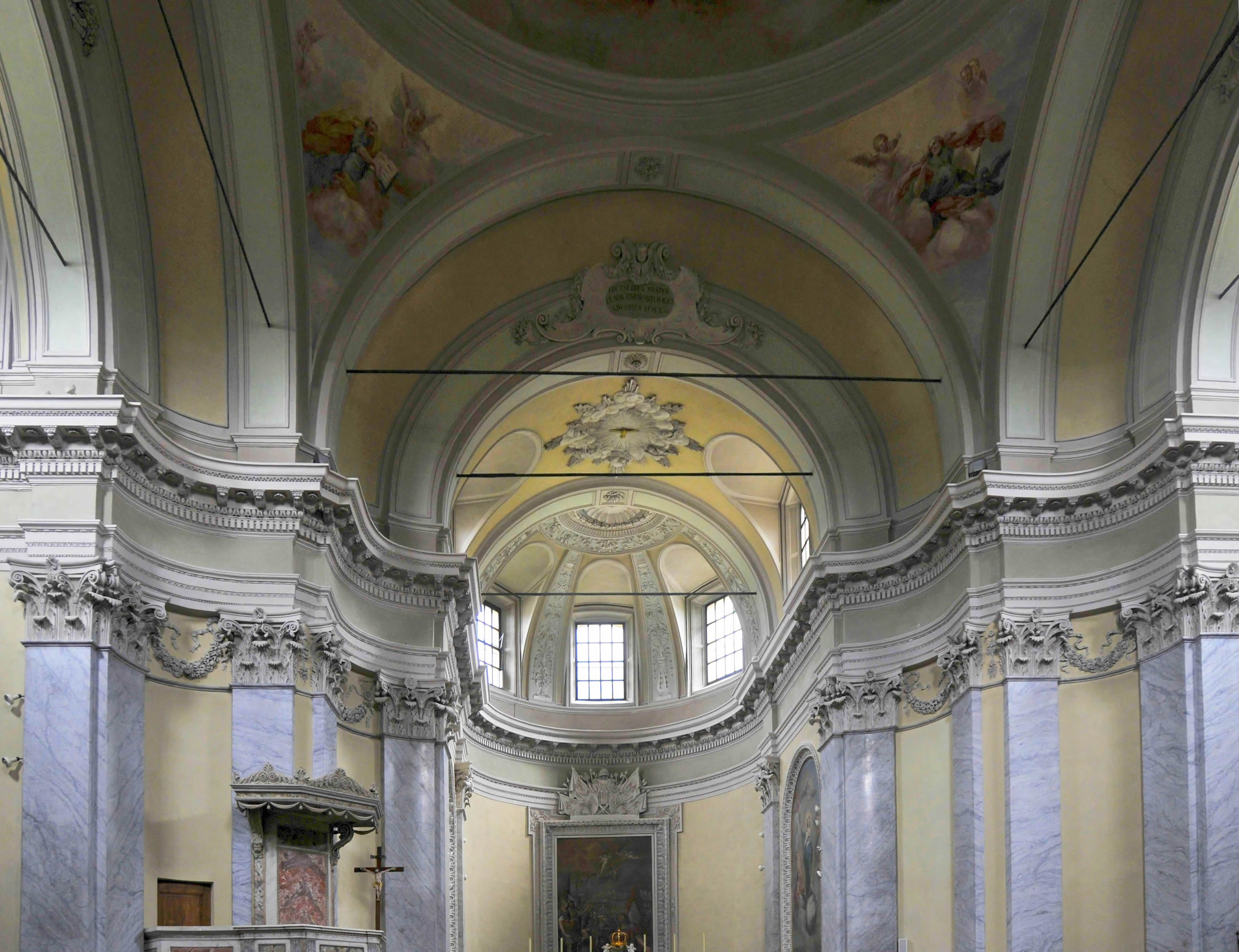 Chiesa di San Maurizio a Bioggio - Decorazione del presbiterio